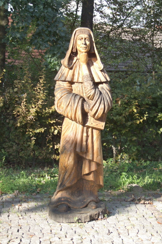 Figur near the church in Arneburg, title:Der Mönch von Arneburg, artist:Karolin Donst